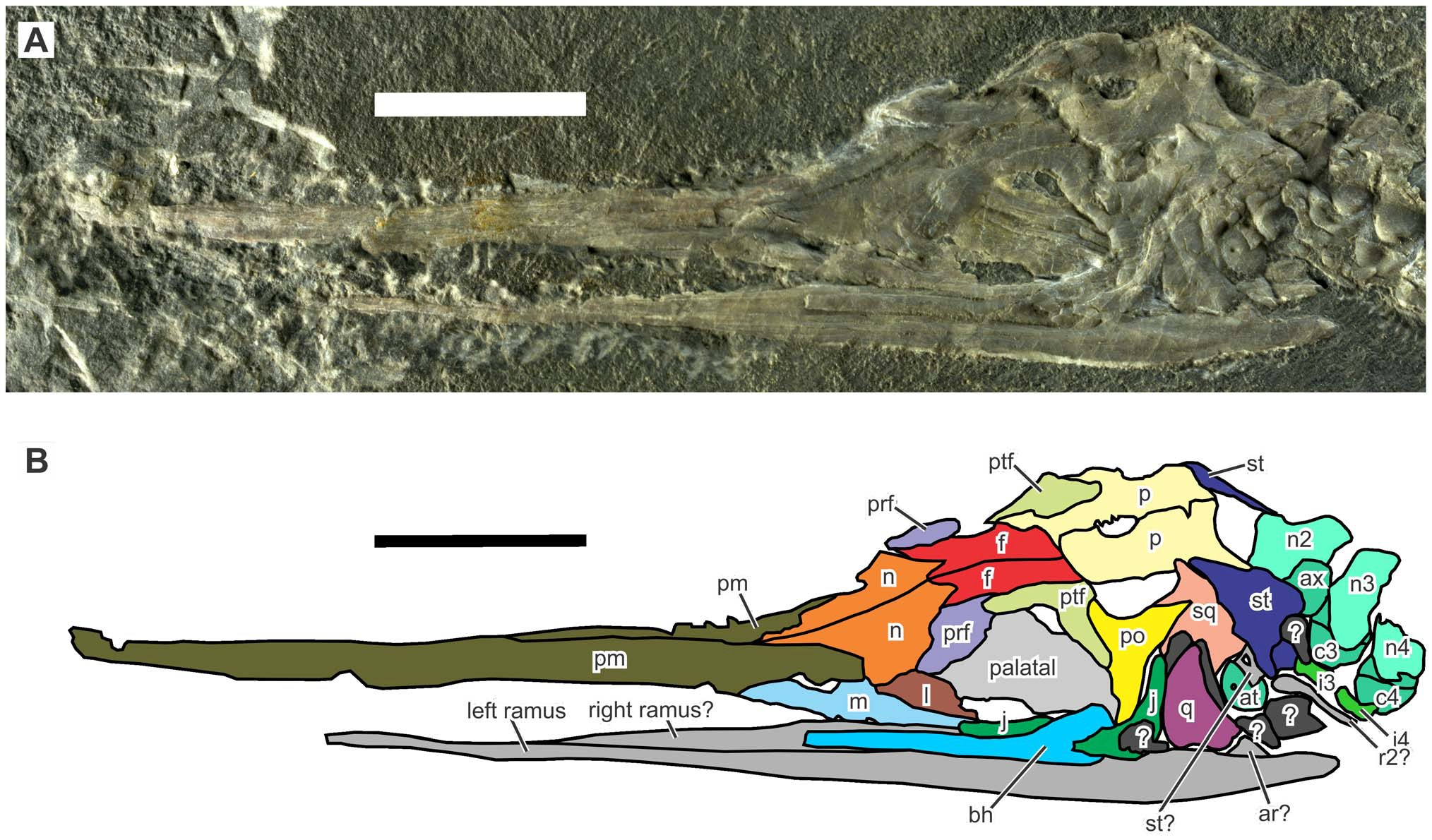 Skull of Eohupehsuchus brevicollis, WGSC V26003. Scales are 1 cm long. Symbols: ar, articular; at, atlantal pleurocentrum; ax, axis centrum; bh, basihyal (?); c#, centrum; f, frontal; i#, intercentrum; j, jugal; l, lacrimal; m, maxilla; n, nasal; n#, neural spines; p, parietal; pm, premaxilla; po, postorbital; prf, prefrontal; ptf, postfrontal; q, quadrate; r#, rib; sq, squamosal, st, supratemporal. Colors: dark gray, unidentified bones; light gray, unidentified palatal bones; medium gray, unidentified mandibular bones.